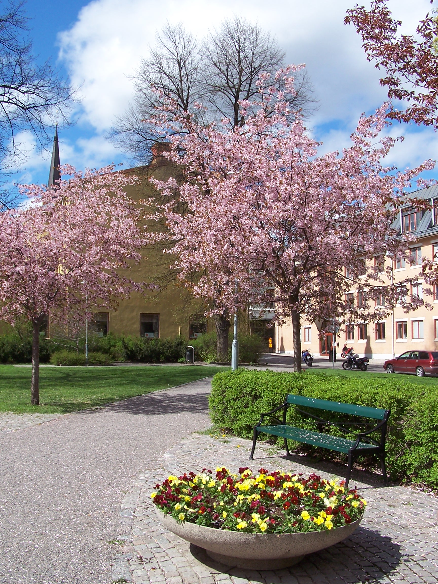 Hedbergska parken i Sundsvall, maj 2006.